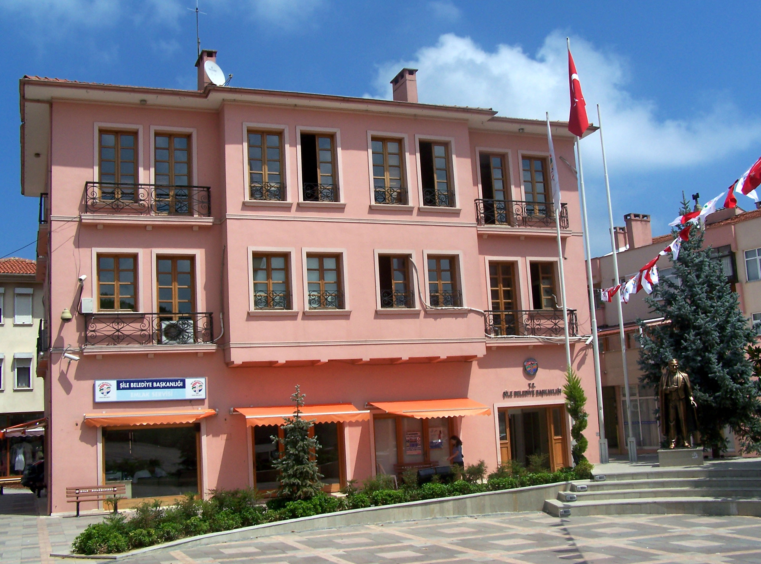 Şile Belediye Başkanlığı (Şile Municipal Office) in Şile, Turkey